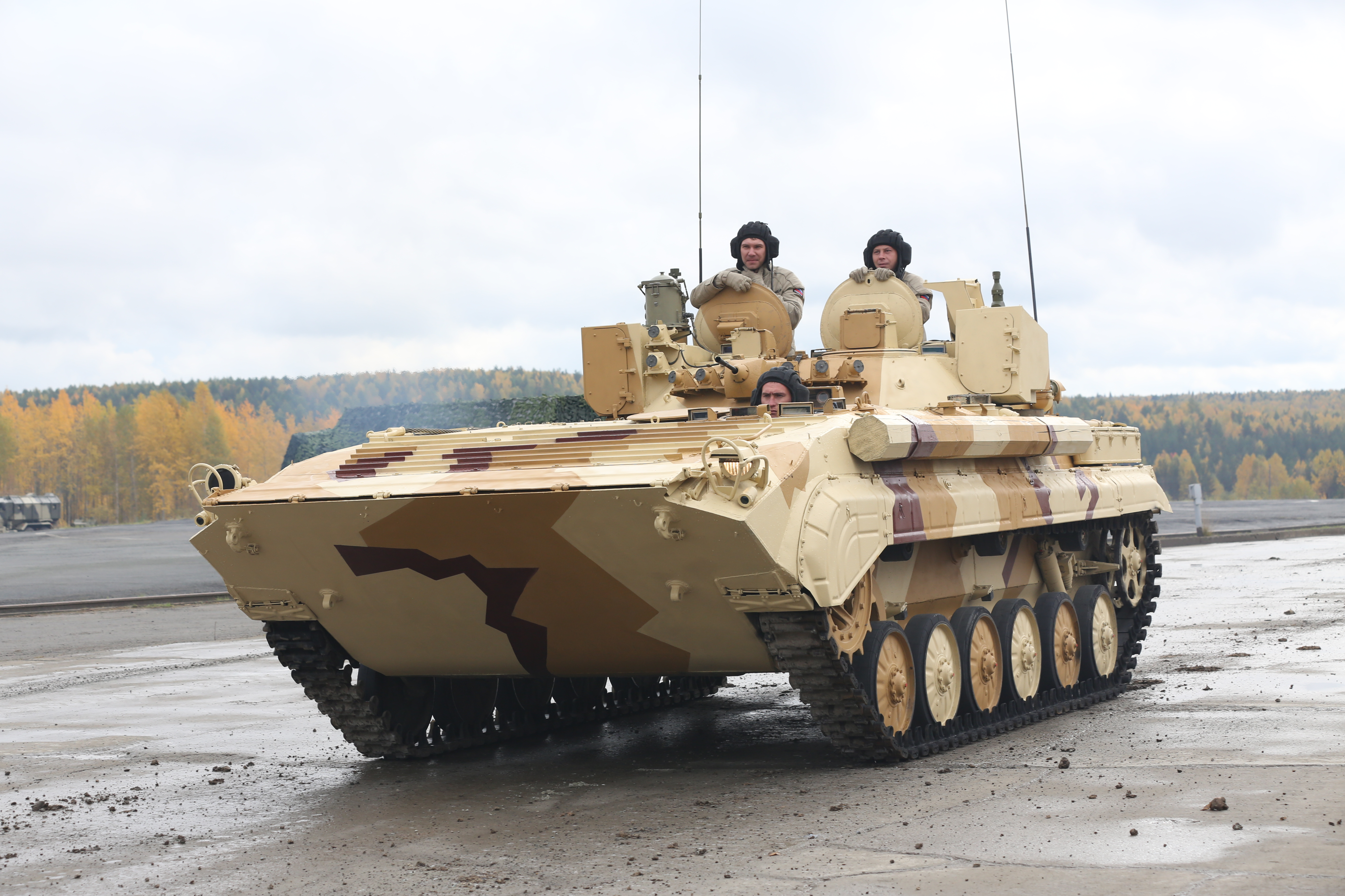 Подвижный разведывательный пункт ПРП-4А (Mobile reconnaissance post PRP-4A)